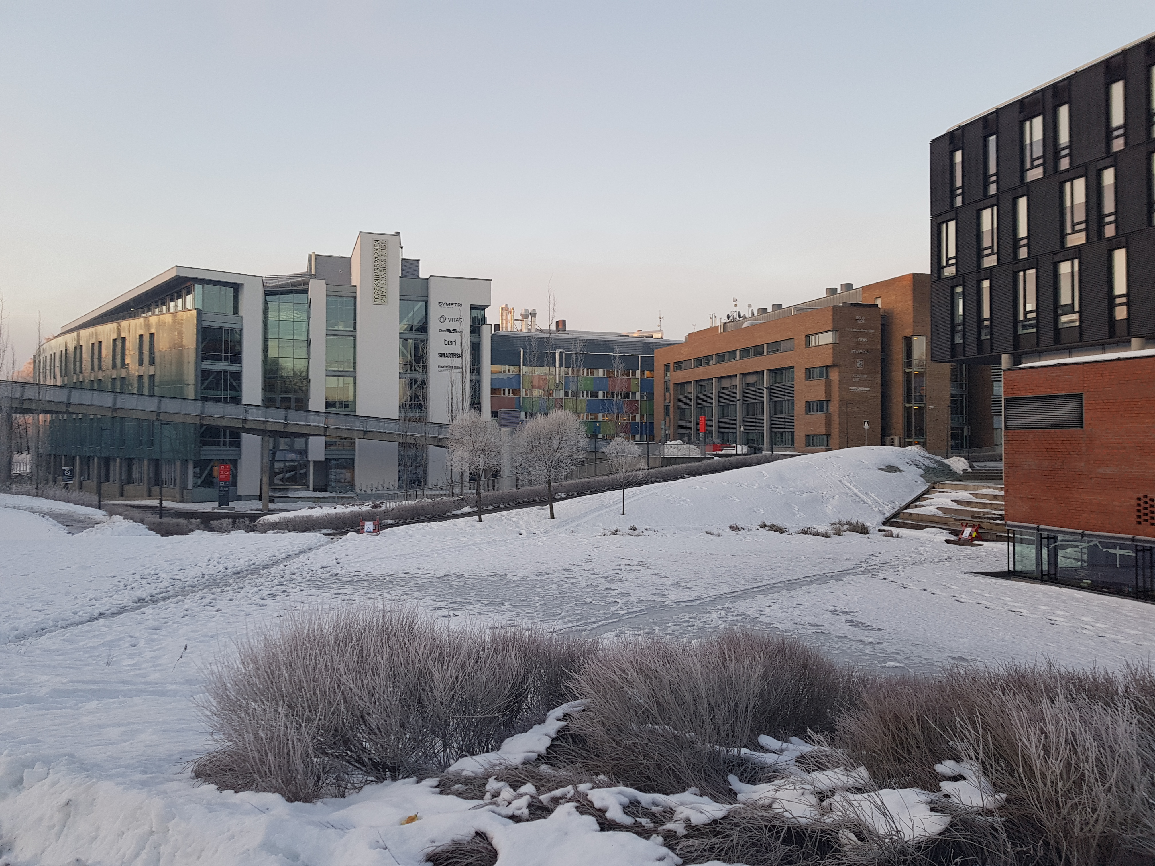 Forskningsparken i Oslo